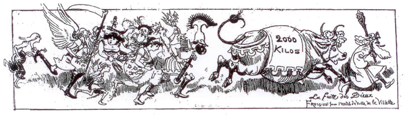 Caricature de la Promenade du Bœuf Gras par Robida, parue en première page de "La Caricature" le 14 mars 1885.